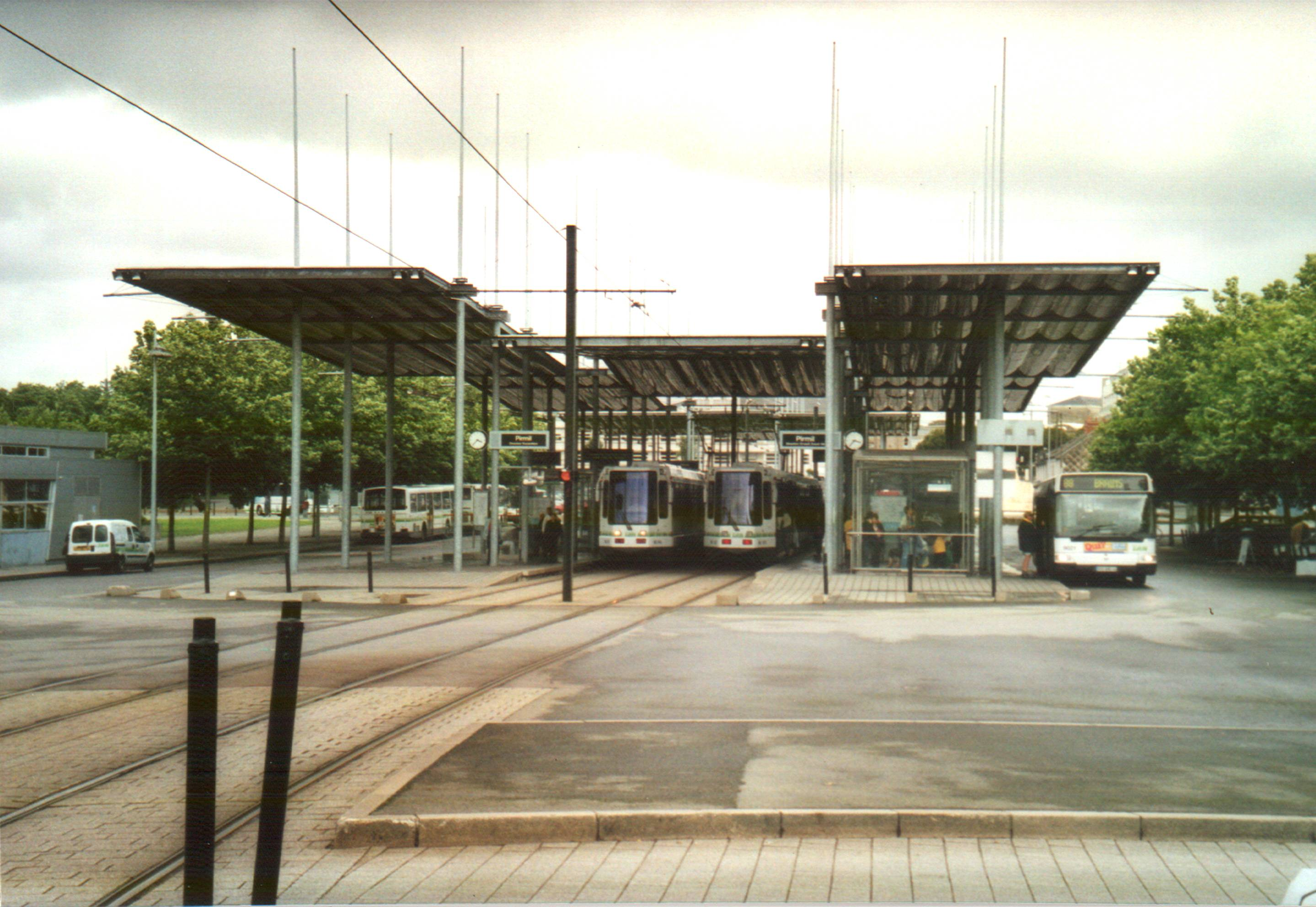 Tramway de Nantes : La station Pirmil est un pôle intermodal Tram / Bus / P+R